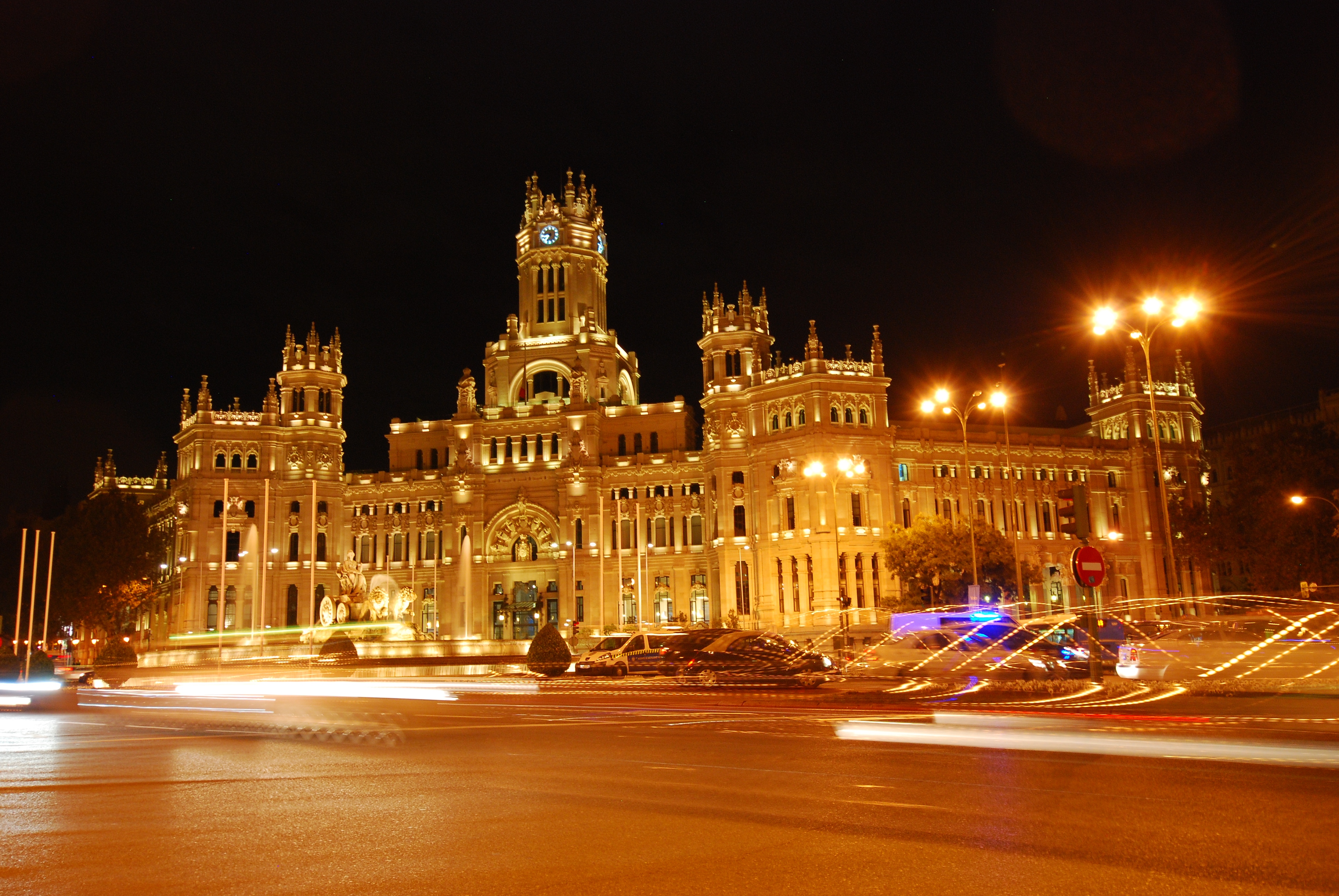 Vista nocturna del Palacio de Telecomunicaciones, Madrid